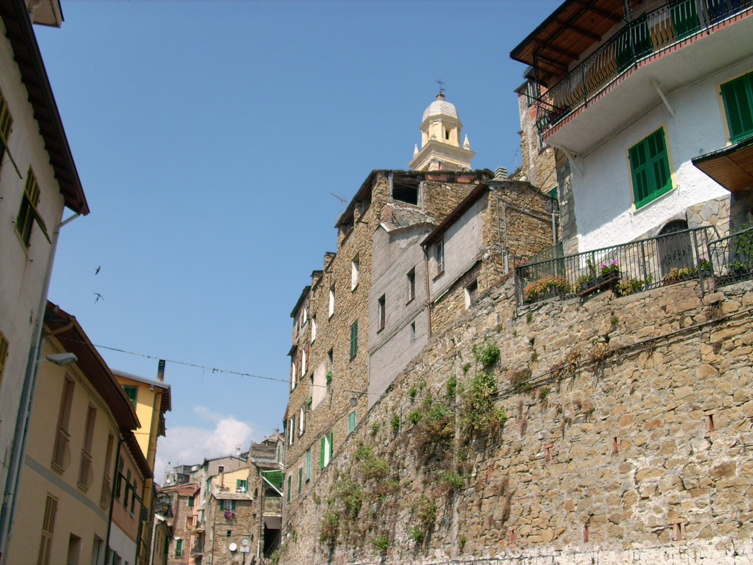 Montalto Ligure, Liguria, Italia